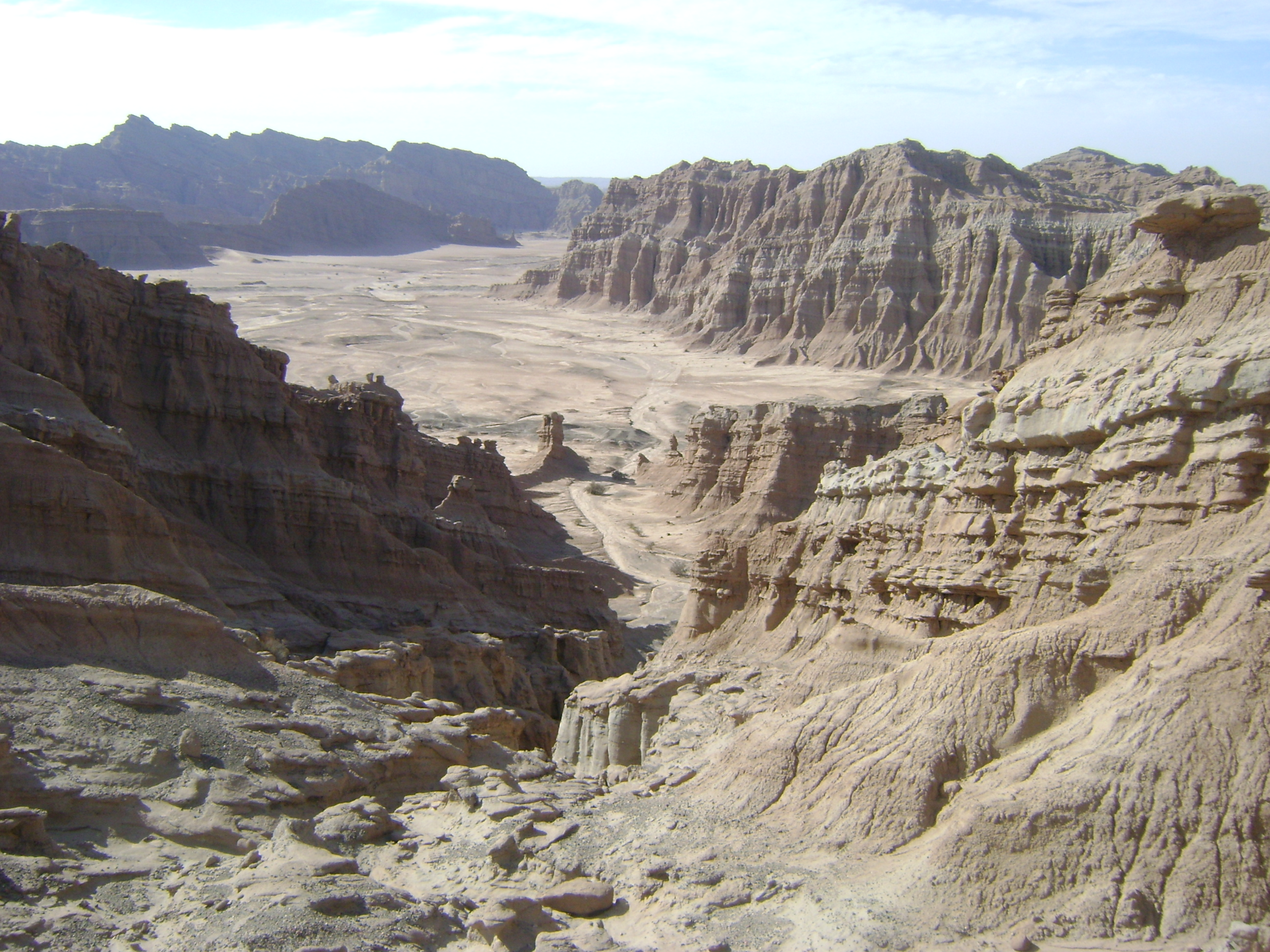 Sierras de Mogna, en cercanías a la localidad del mismo nombre, en departamento Jáchal, provincia de San Juan, Argentina.